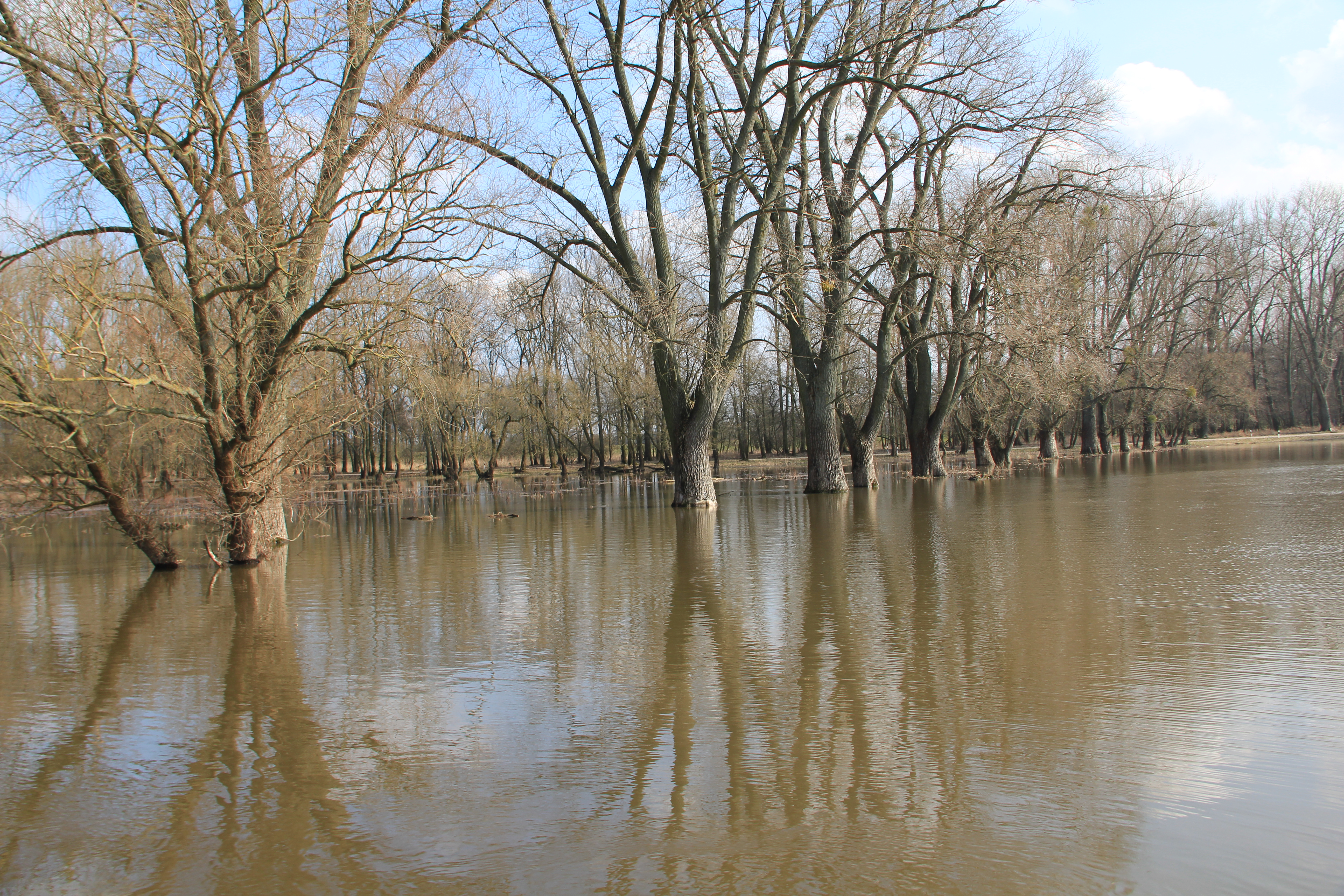 leichtes Hochwasser in der Elbaue an der Elbfähre der Storchenstadt Werben (Altmark), Bundesland Sachsen-Anhalt. (Biosphärenreservat Mittelelbe, FFH Gebiet Elbaue Werben und Alte Elbe Kannenberg